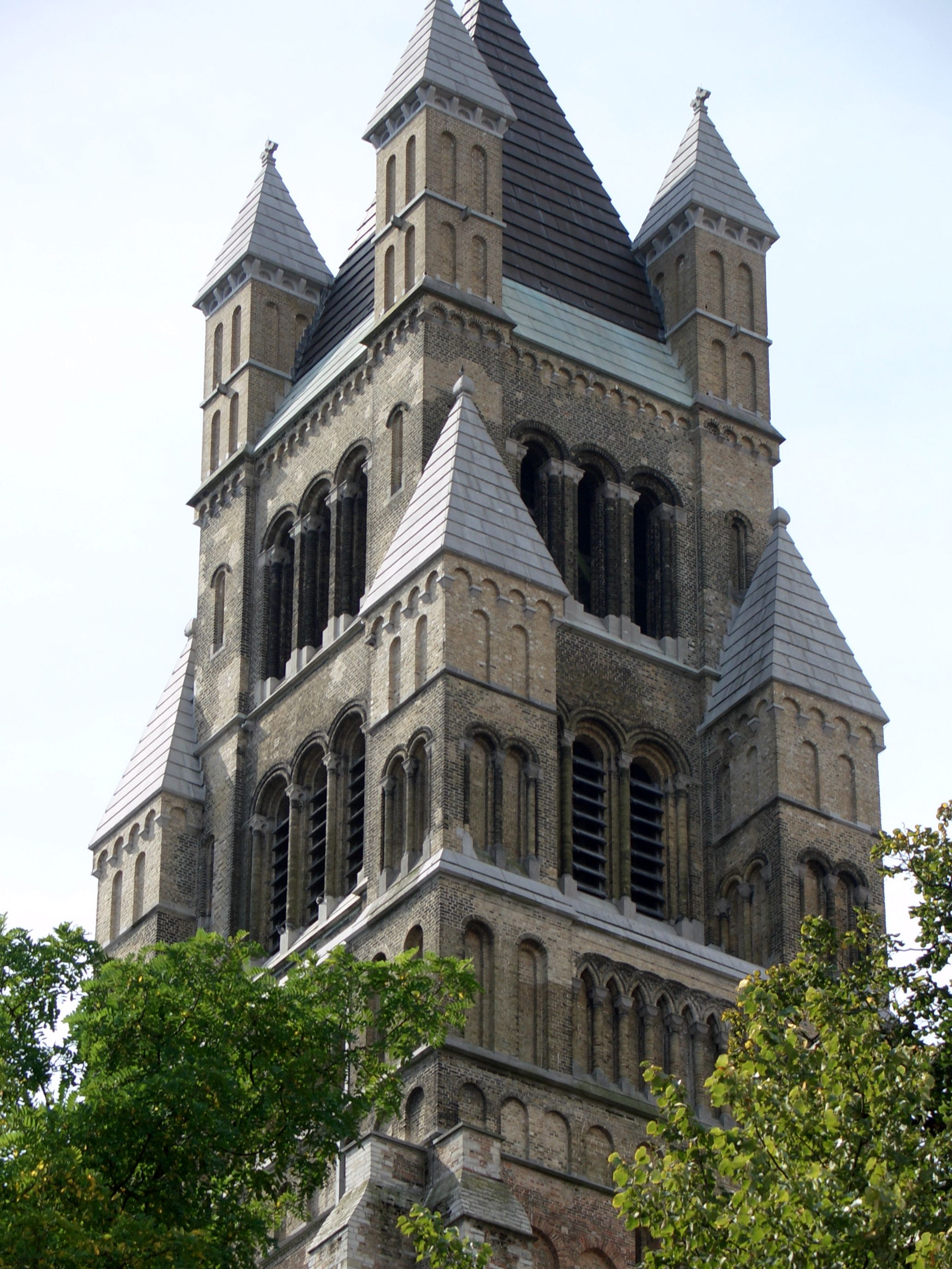 Catedral de Bruges - Campanar